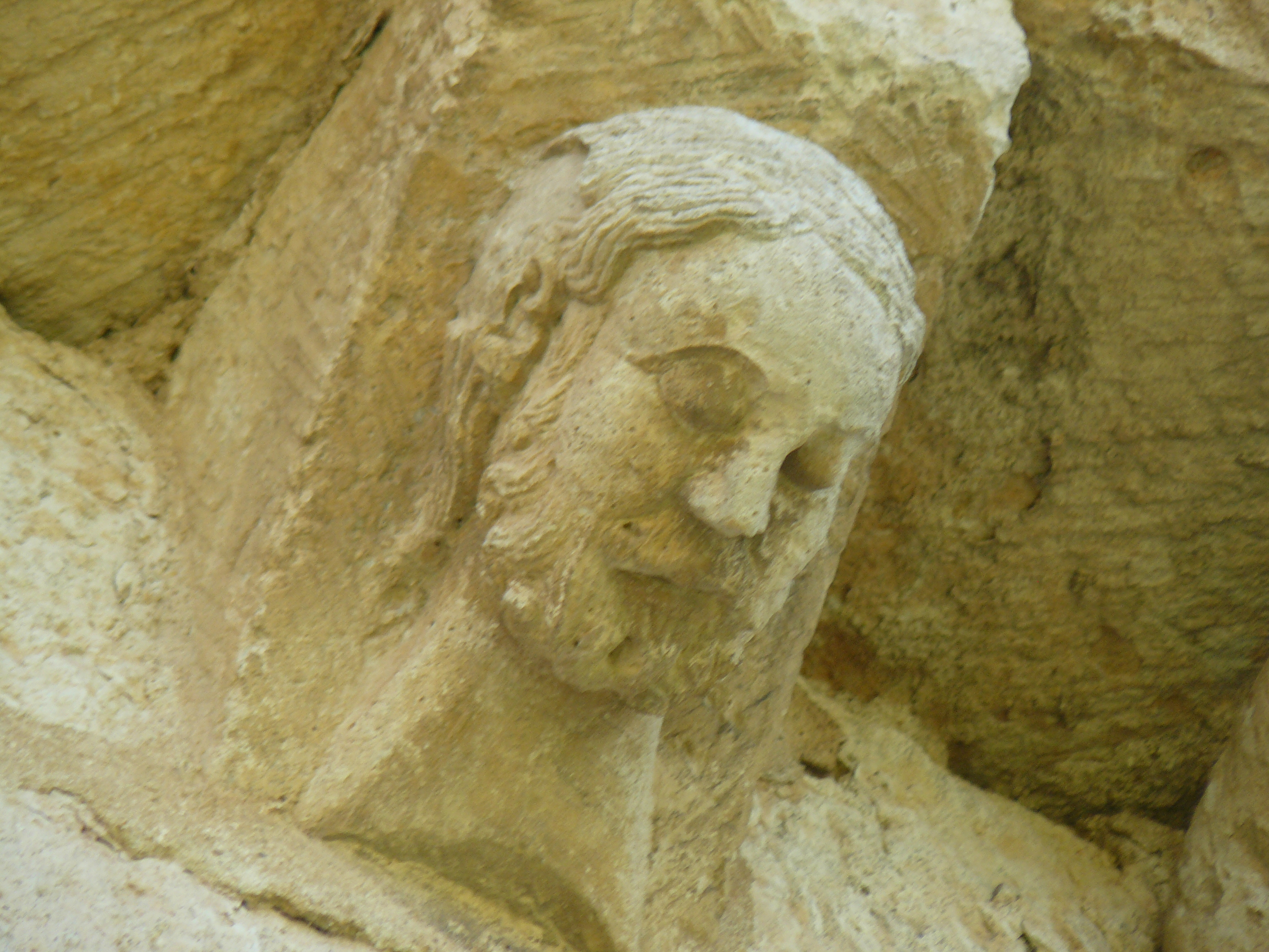 Oquillas, Burgos.